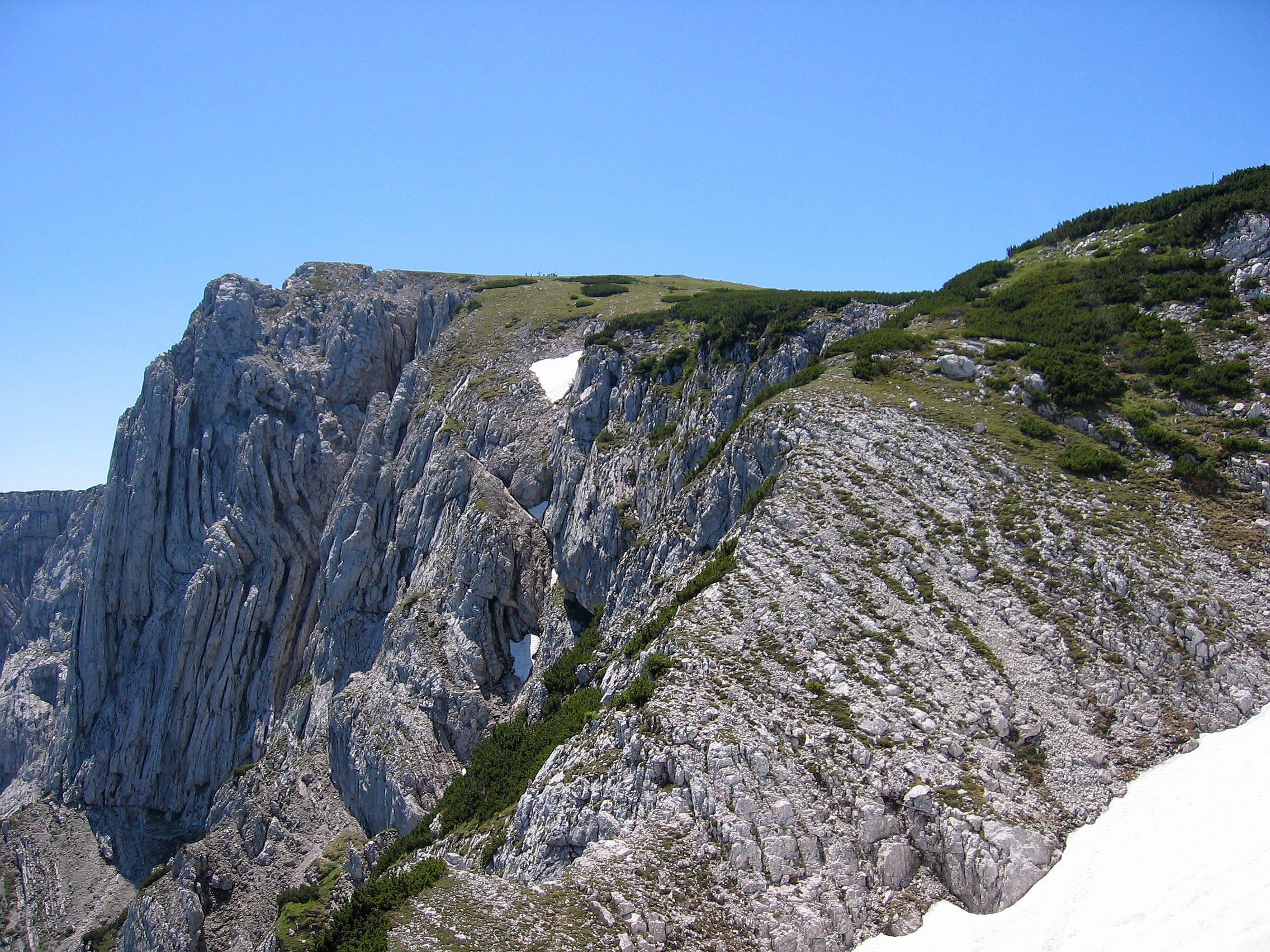 Hoher Nock mit Nockpfeiler vom NO-Grat aus gesehen, Sengsengebirge, Österreich